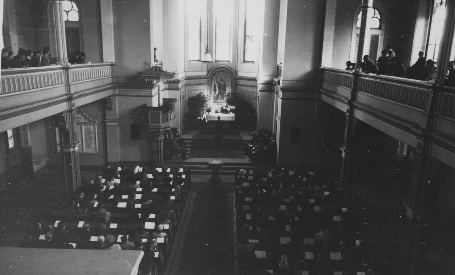 Bohoslužby v libereckém evangelickém kostele, 22.9.1946